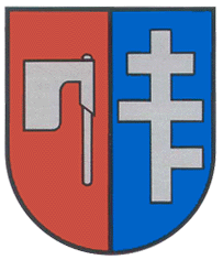 Herb Monasterzysk - XVI wiek